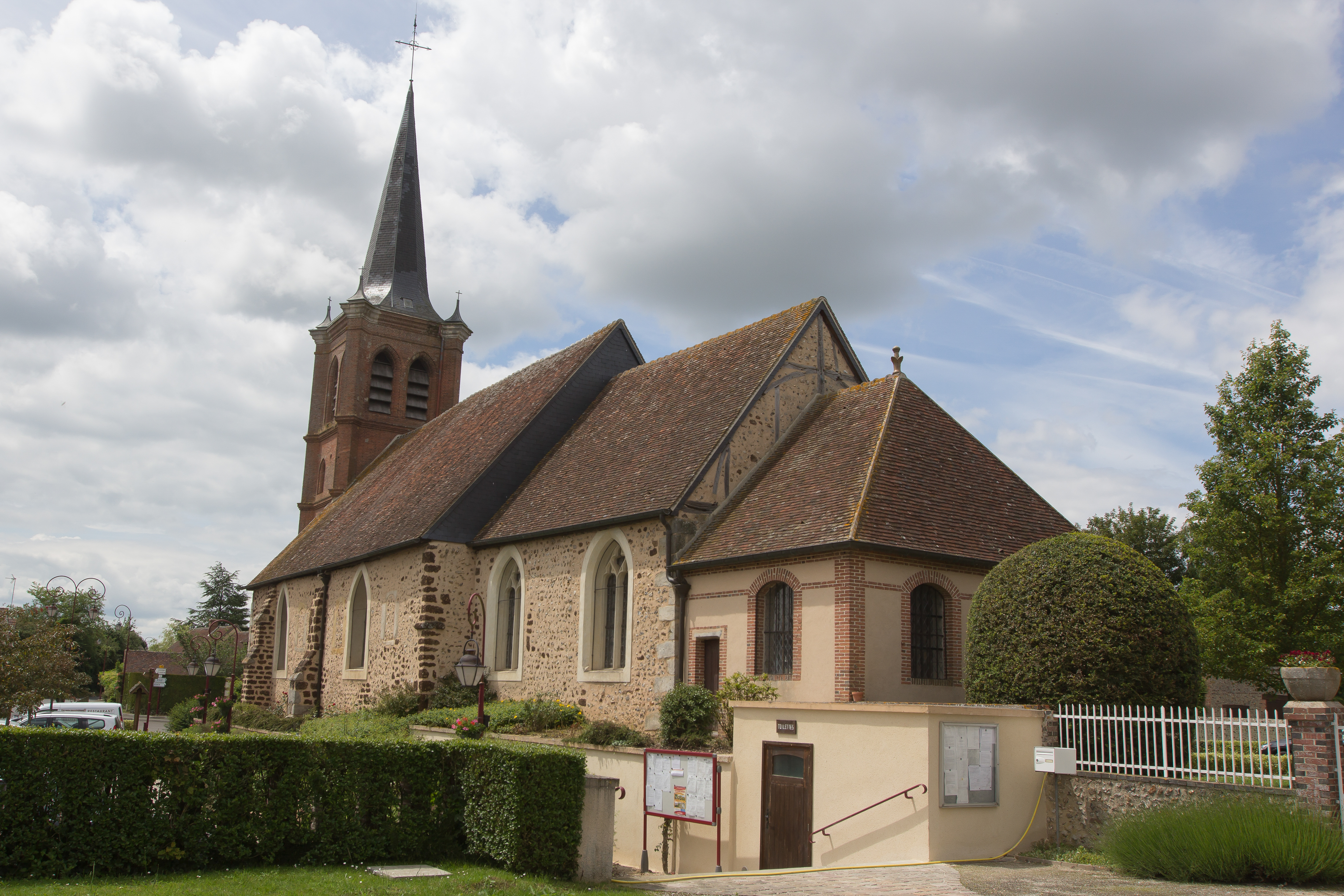 Vue de l'extérieur de l'église Notre-Dame des Barils (Eure, Normandie, France)